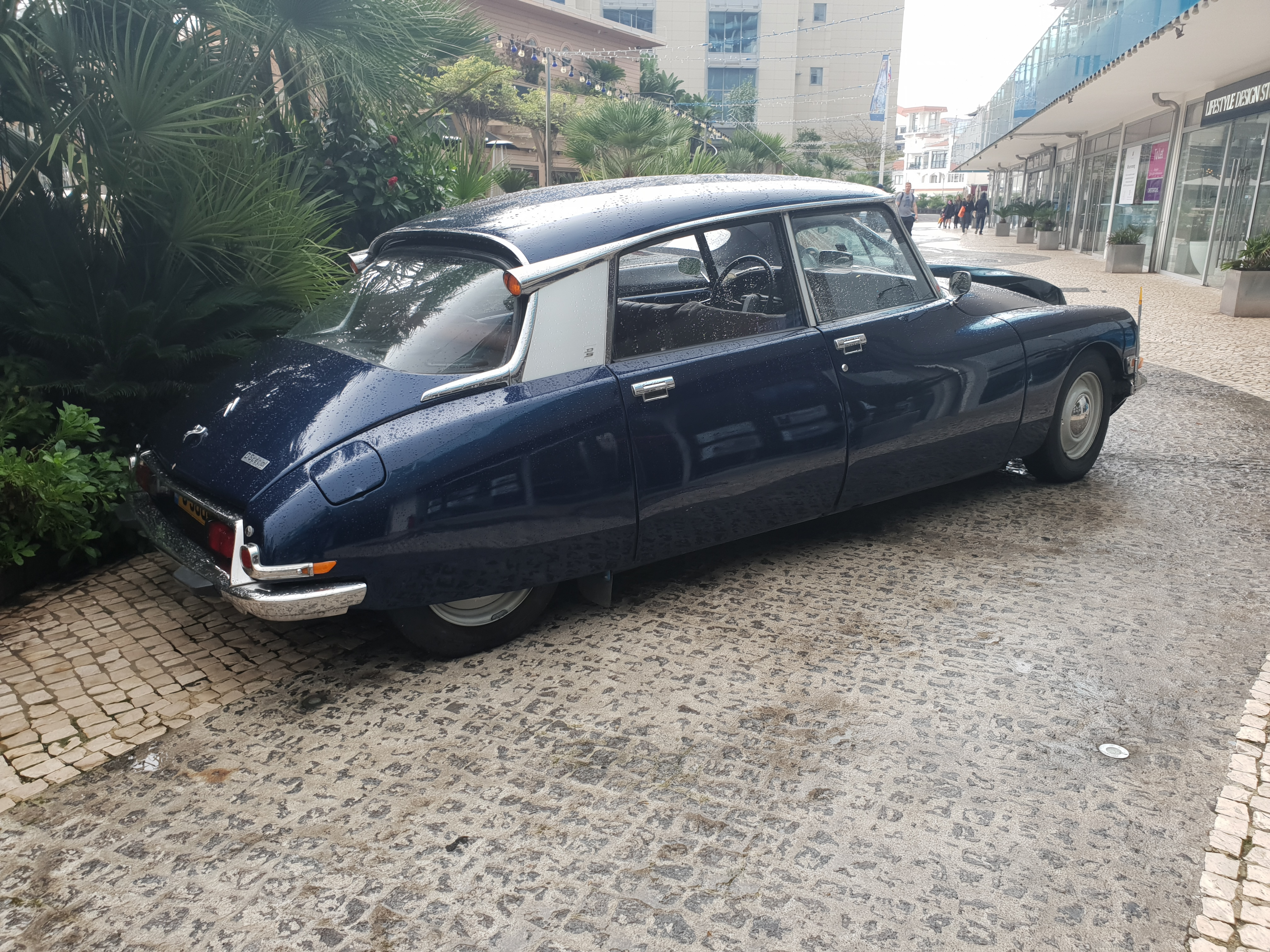 Citroën DS aparcado en Gibraltar